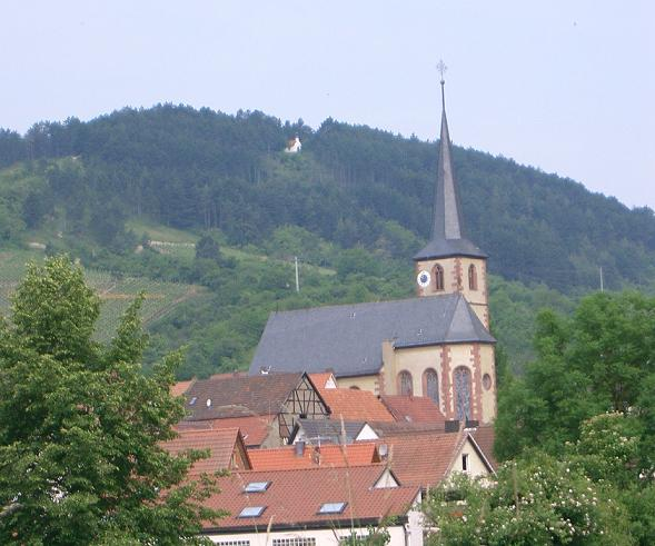 Erlabrunner Kirche, im Hintergrund die Kapelle auf dem Volkenberg mit einem der größten Schwarzkiefer-Wälder in Unterfranken